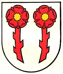 Wappen von Rapperswil SG